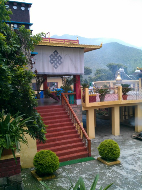 India 2012